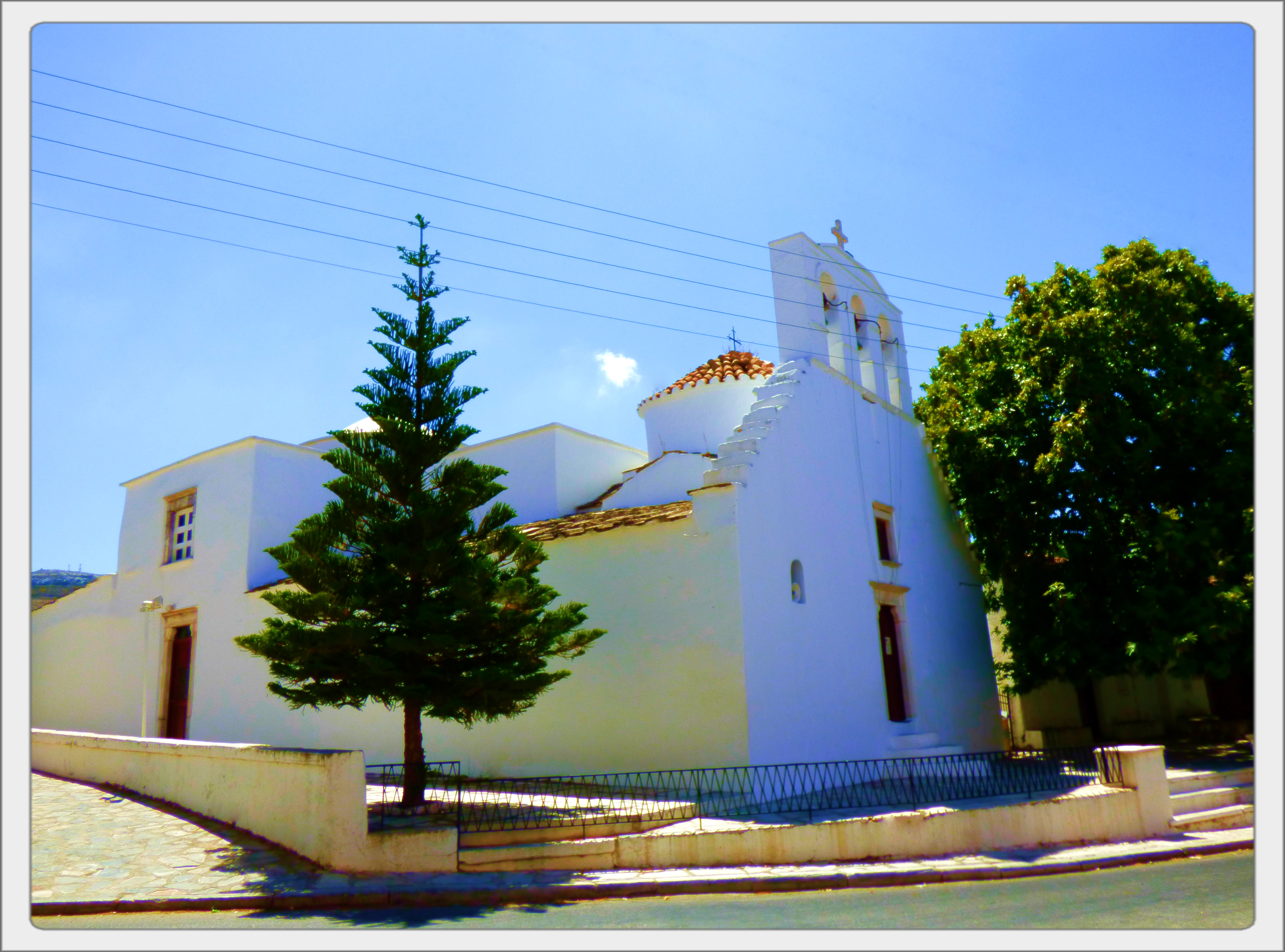 Παναγία Πρωτόθρονος στο Χαλκί Νάξου